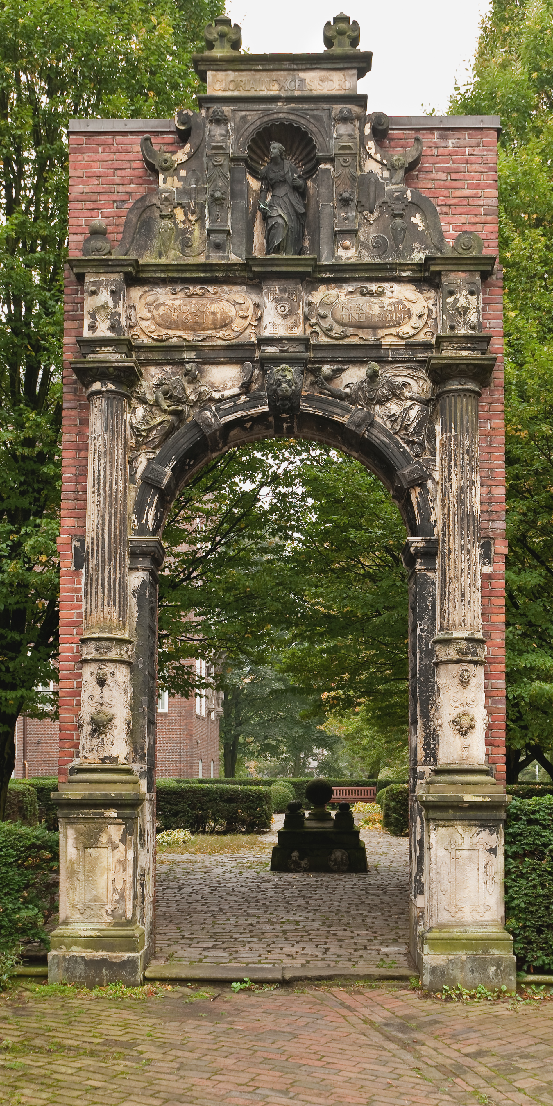 Standort: Aufgestellt im Schmuckgarten; nördlich des Museums Herkunft: Rödingsmarkt 60 Inschriften: GLORIA IN EXCELSIS DEO ANNO DOMINI 1631 NESCIT HOMO FINEM SUUM Zustand: Geringe Mängel